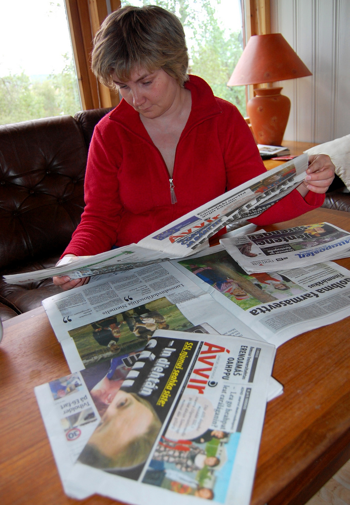 Aili Keskitalo er presidentkandidat og leder i Norske Samers Riksforbund (NSR).